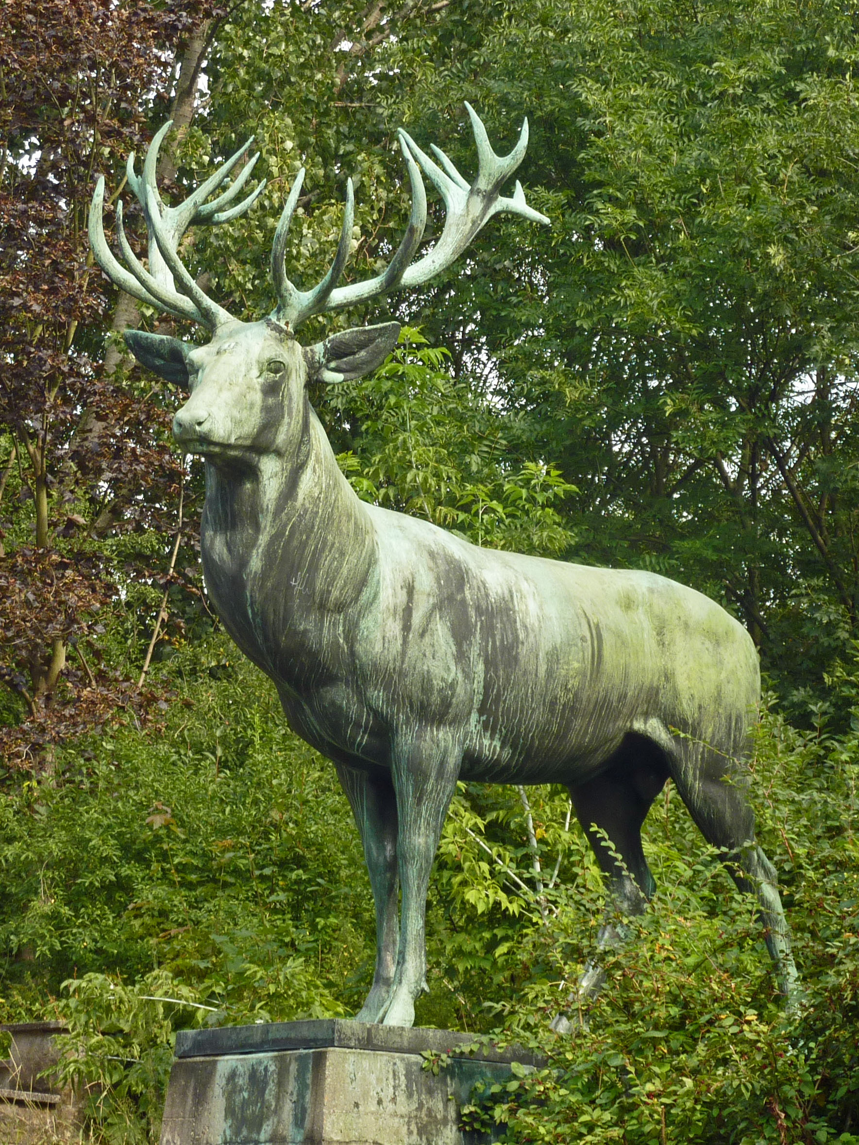 Bronzeplastik 'Kronenhirsch' (Rothirsch mit besonders prächtigem Geweih) von Johannes Darsow aus dem Jahr 1937, früher in Carinhall. Standort im Tierpark Berlin (Friedrichsfelde) an der Freilichtbühne.